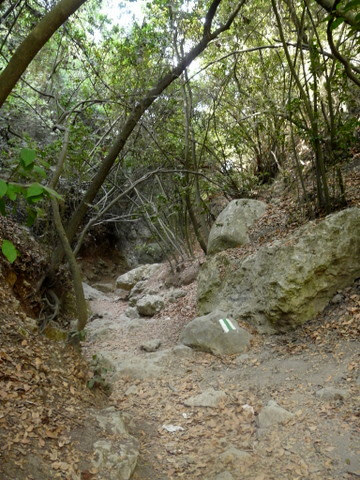 Wadi khik - Mount Carmel Part of Israel National Trail נחל חיק זורם במורדותיו המערביים של הר הכרמל. ראשית הנחל באזור הכרמל הגבוה ליד היישוב עוספיה ליד נקודת רום כרמל . הוא זורם מקו פרשת המים לכוון מערב ונשפך לנחל אורן. הנחל הוא חלק ממסלול שביל ישראל.